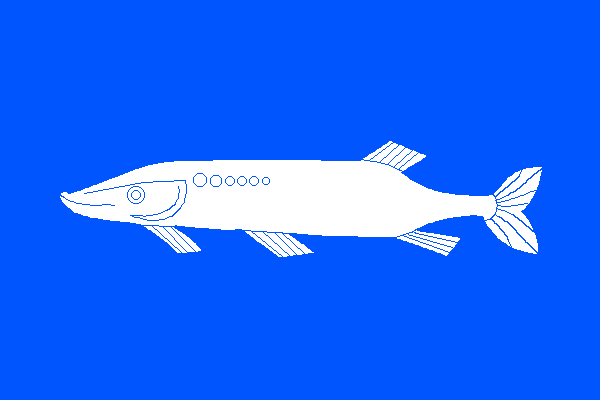 Vlajka Rosic v okrese Brno-venkov Zdroj: Do PNG převedl -df